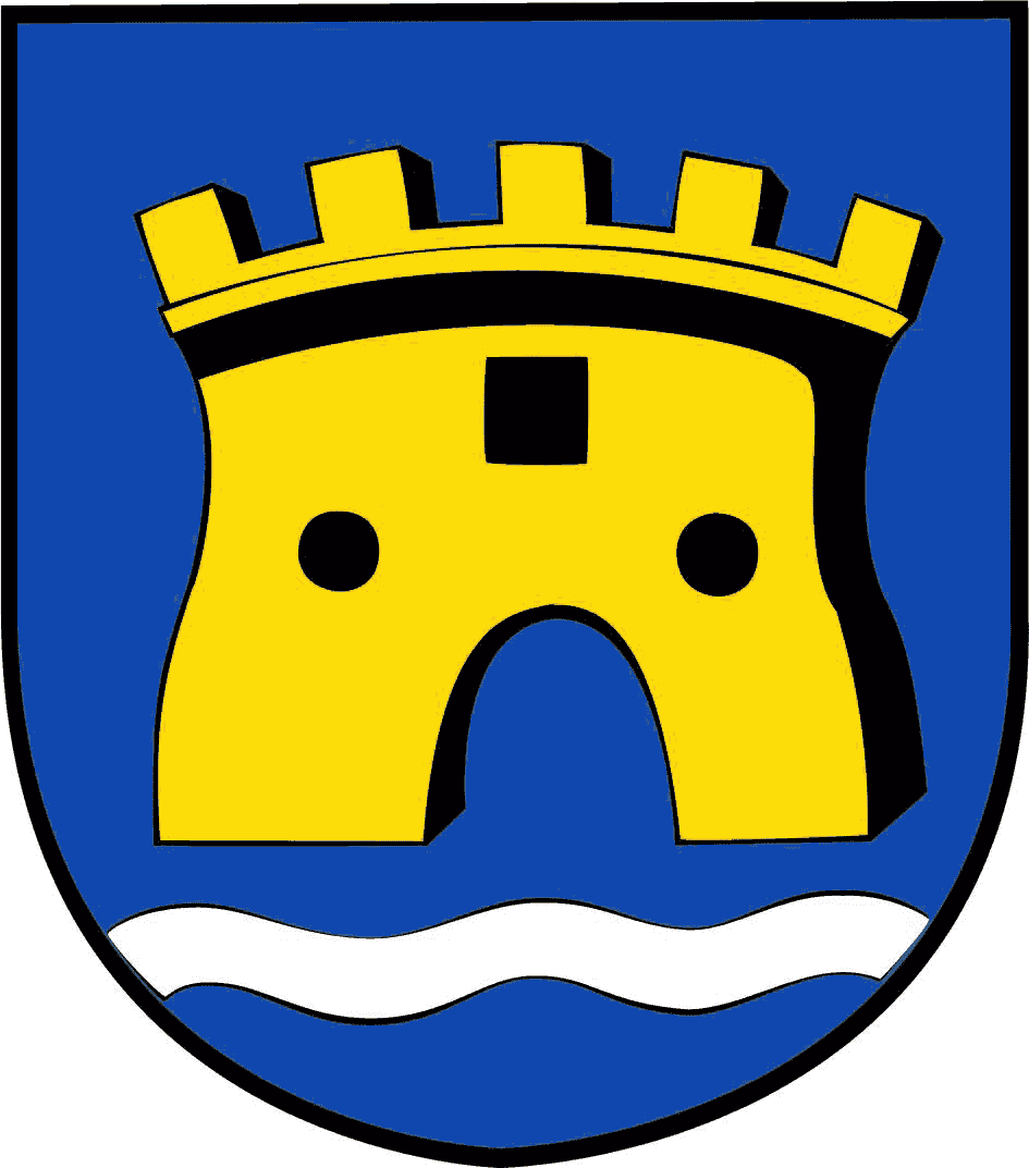 Das Wappen der Gemeinde Hinte zeigt in „Blau über silbernen Wellenbalken einen goldenen mit fünf Zinnen gekrönten Turm mit offenem Tor“.